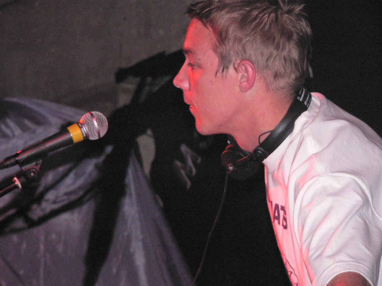 Philadelphia DJ Diplo.